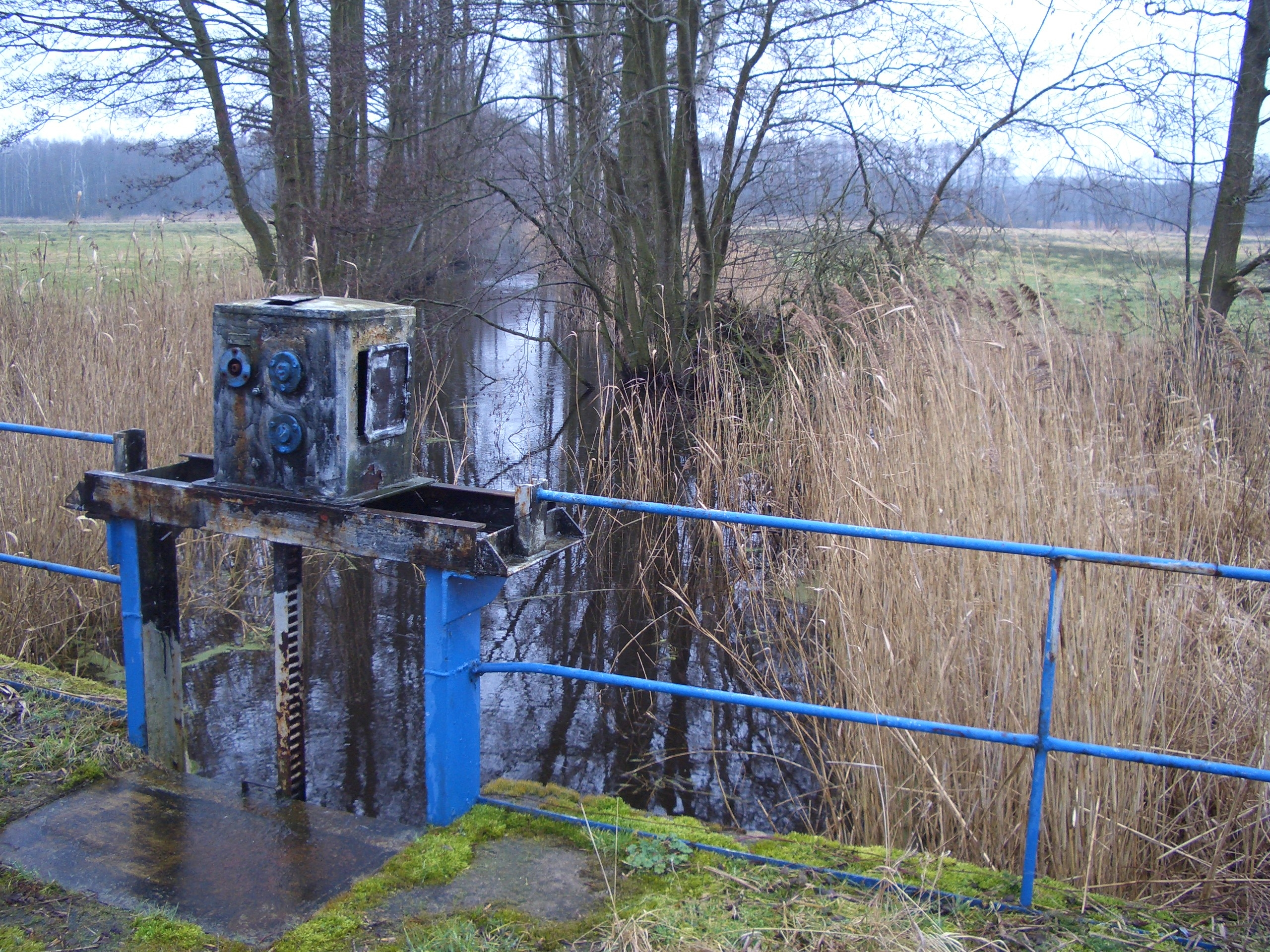 Zerninseesenke. Stau. - Google Maps - Google Earth